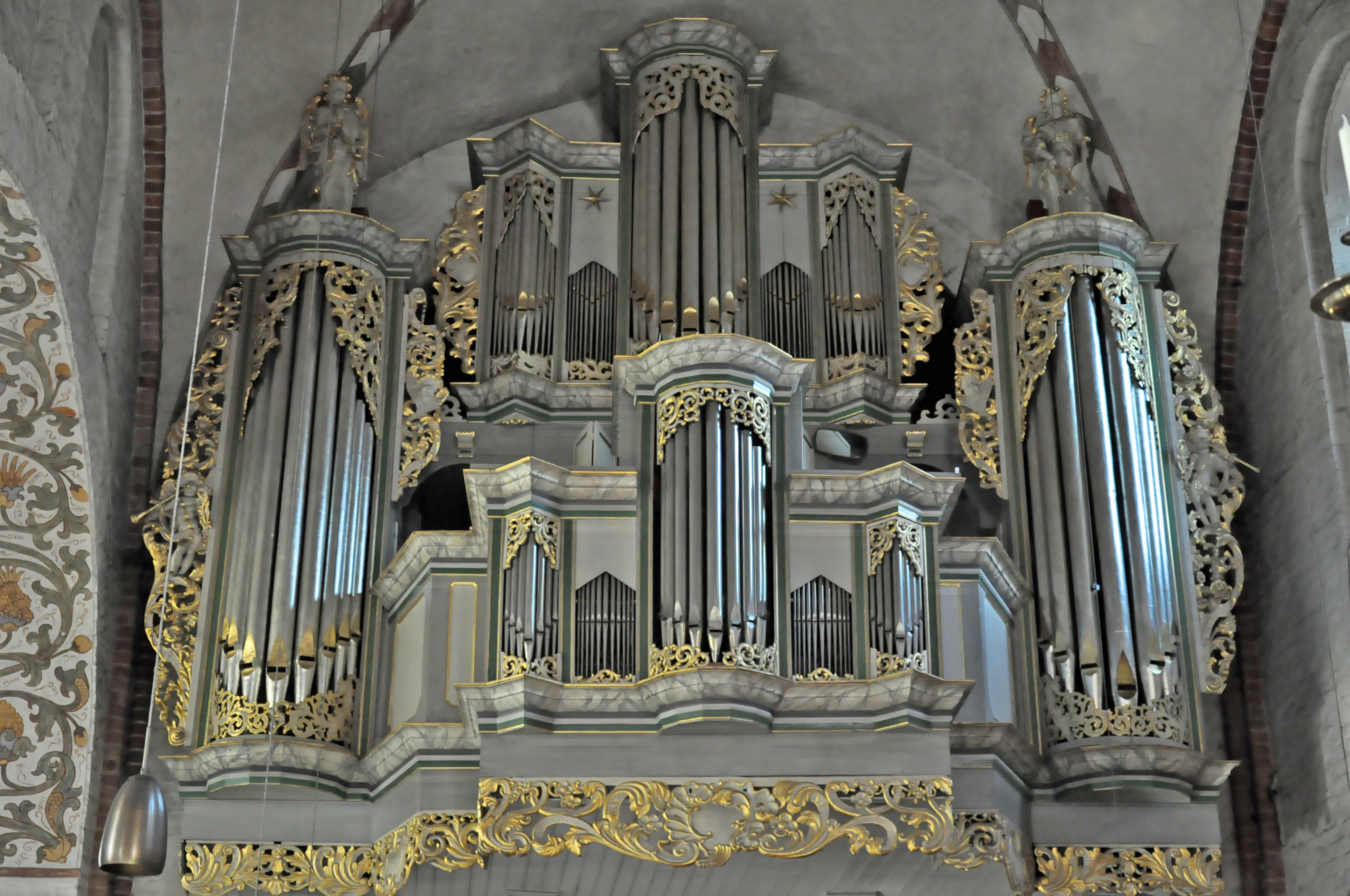 Orgel von St. Nicolai, Mölln, Schleswig-Holstein